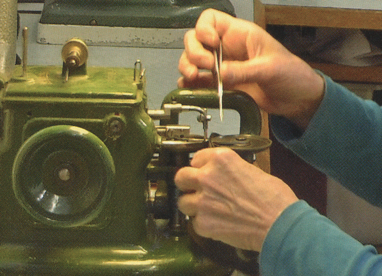 Firma Grevenstein, Mode in Pelz & Leder, Aachen, Theaterstraße 15. Geschäftsaufgabe März 2016. Nähen mit der Pelznähmaschine.